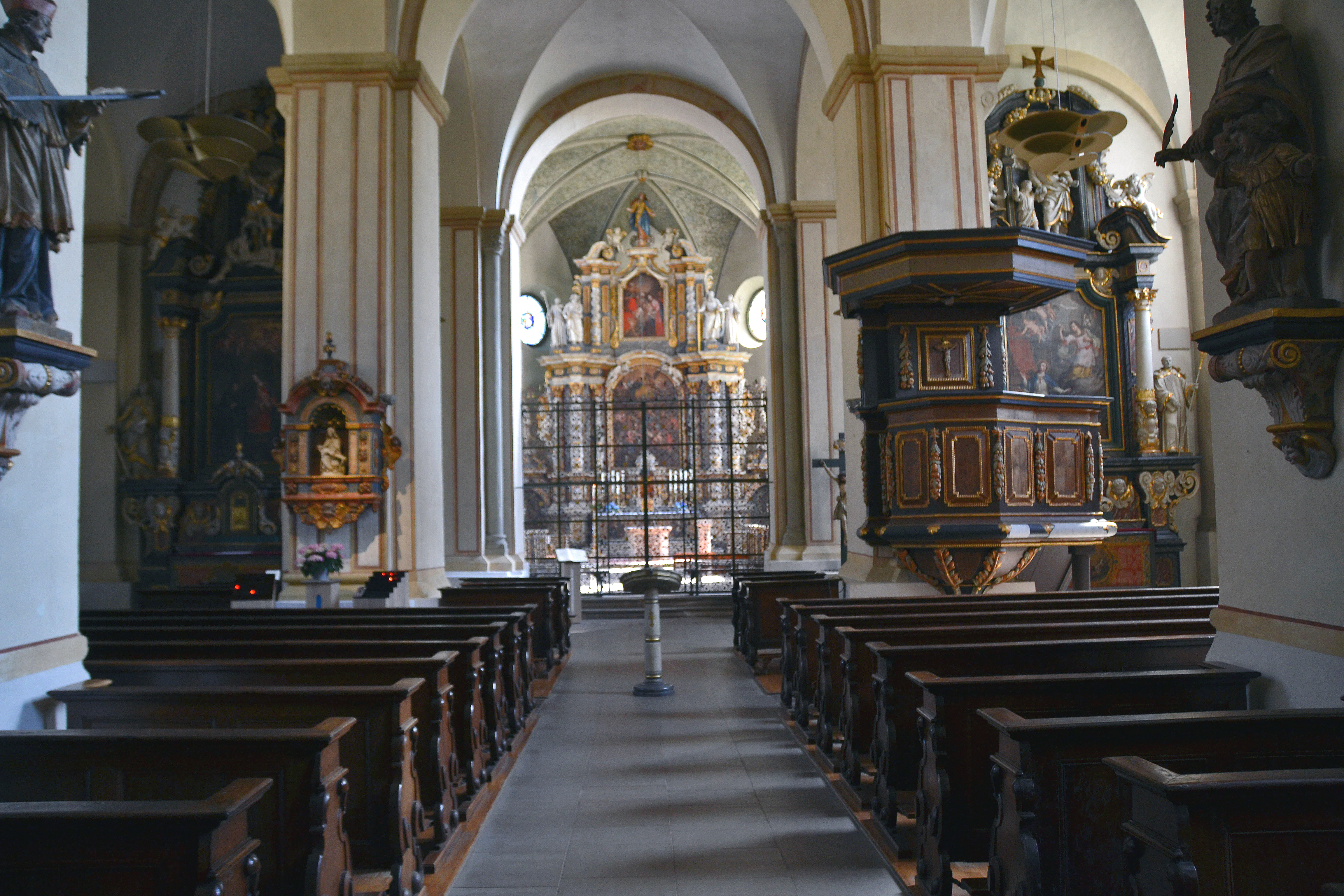 ehemalige Abteikirche mit barocker Innenaustattung